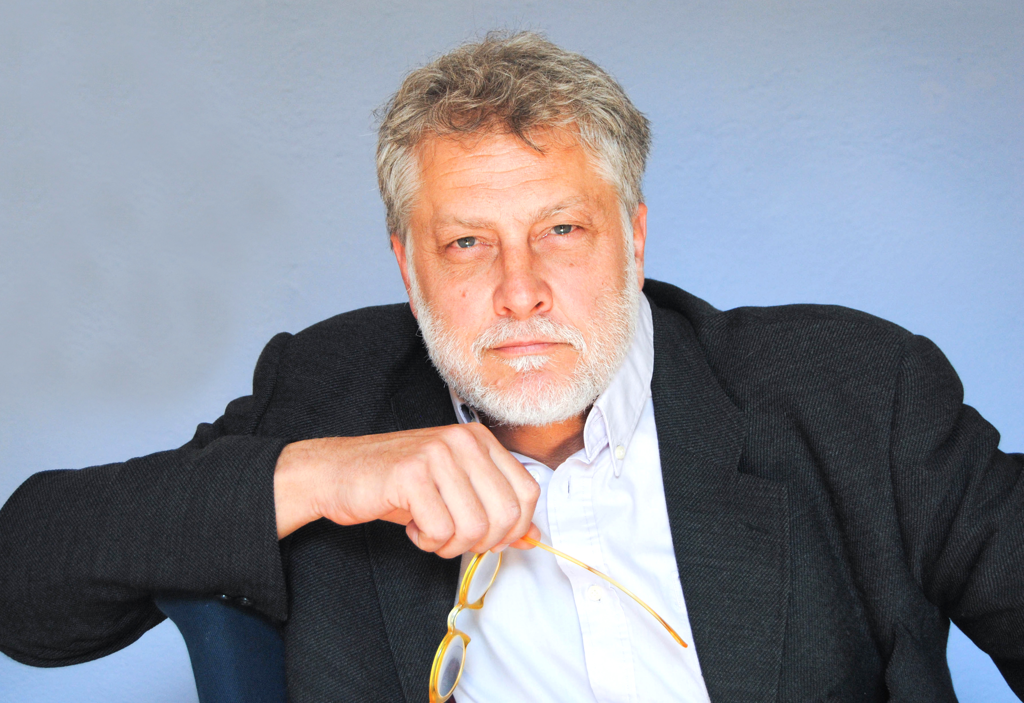 Amerigo Fontani Firenze